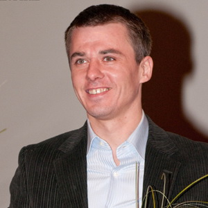 Игорь Петренко на премьере фильма «Мы из будущего 2» в кинотеатре «Октябрь»